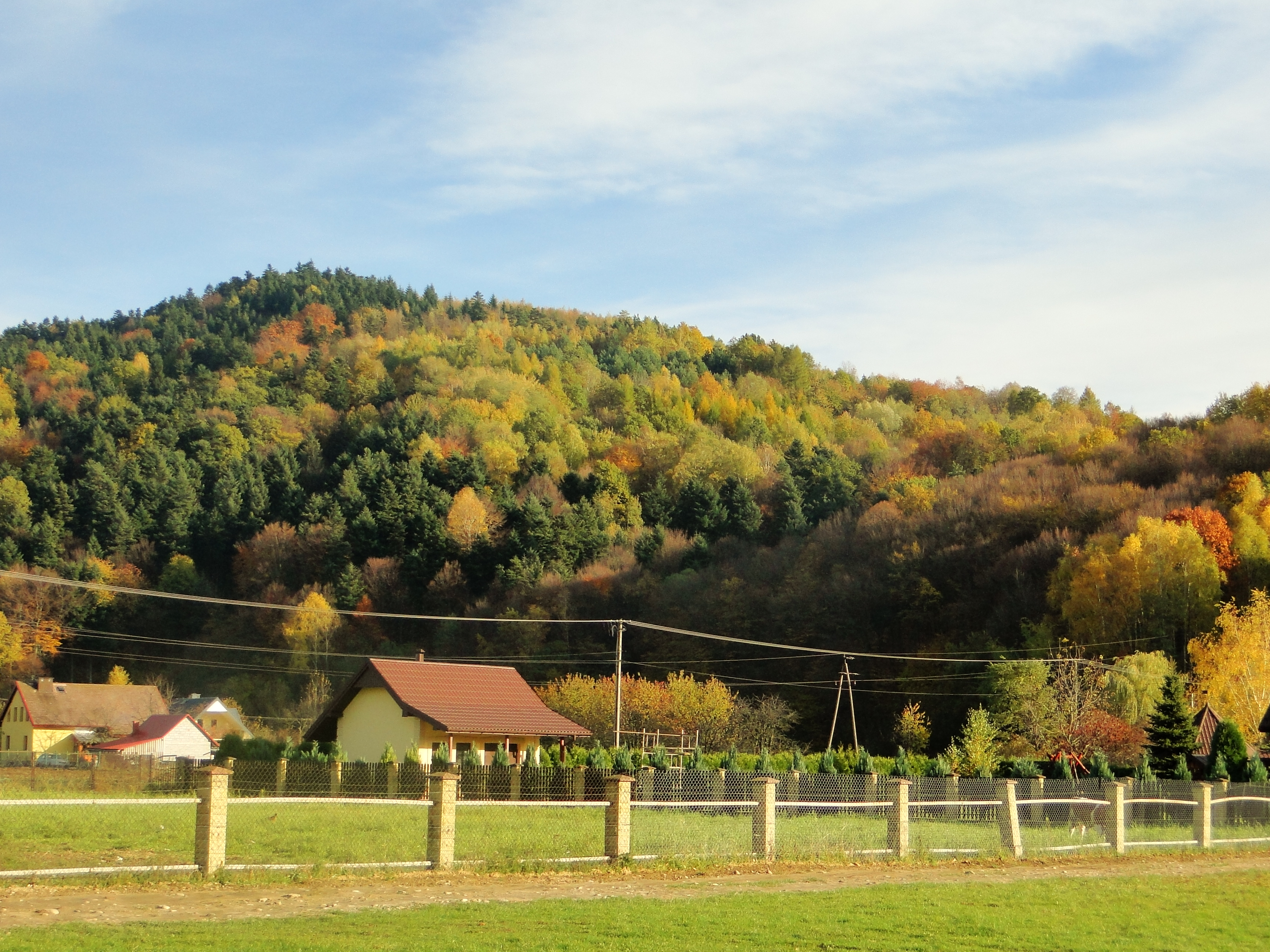 Szczyt Głowaczki jesienią, widoczny z Piasków Drużków